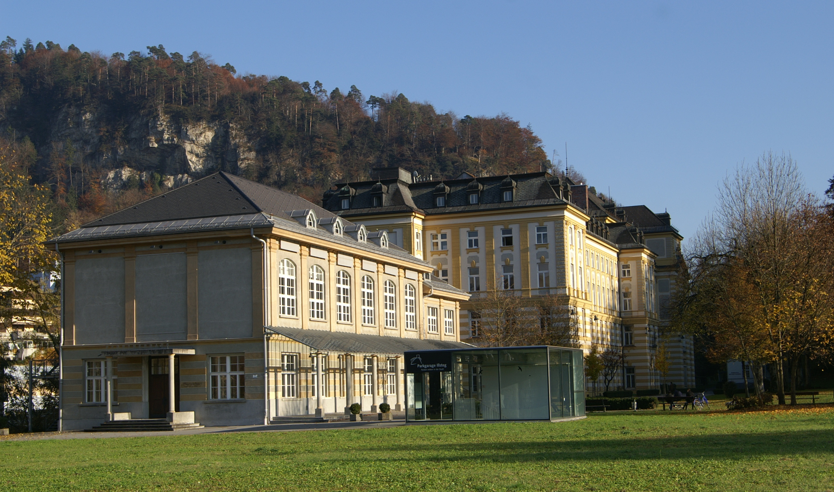 das Stella Matutina, heute Landeskonservatorium wurde 1899 durch Peter Hutter in Feldkirch, Vorarlberg erbaut.